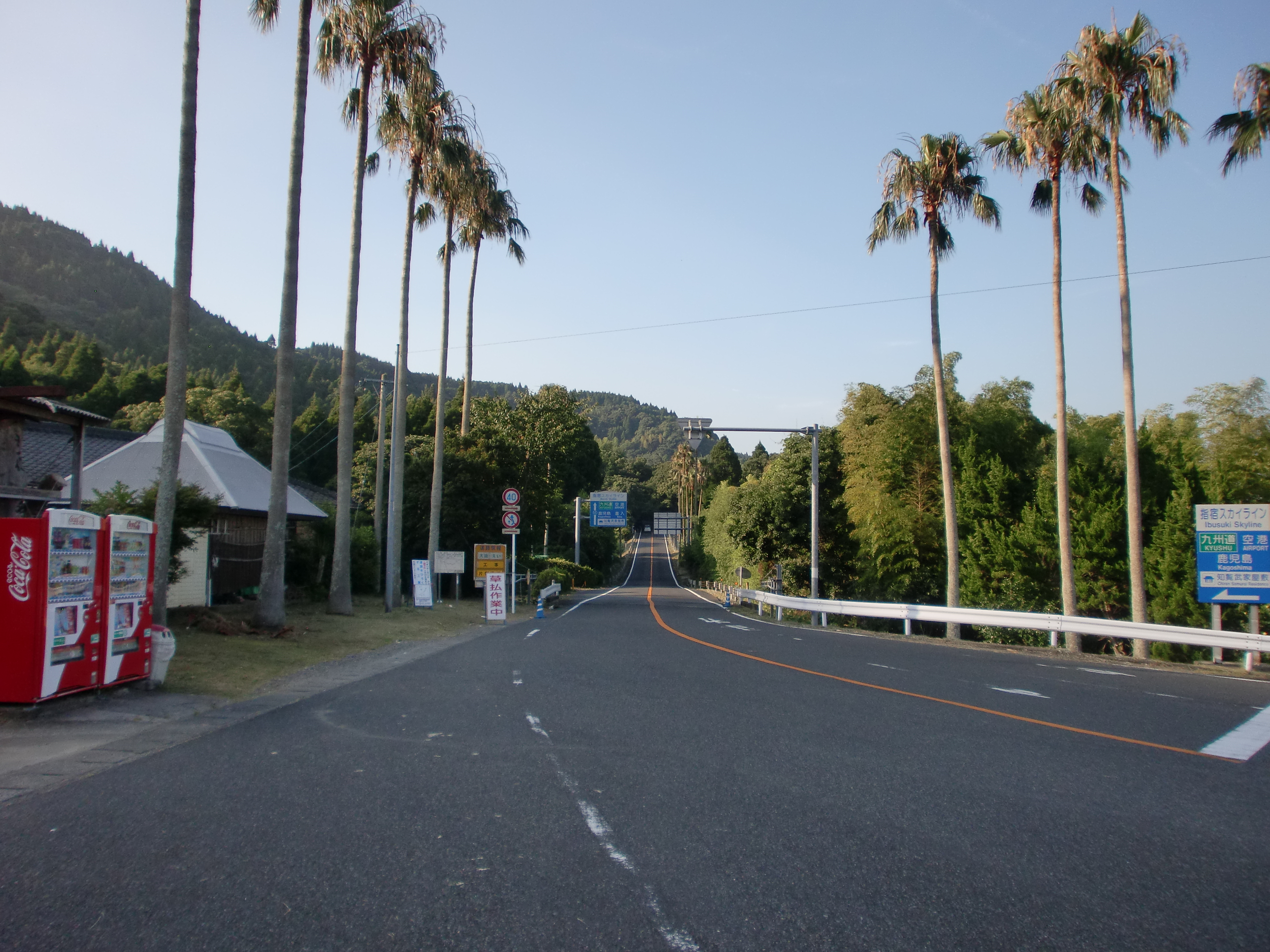 鹿児島県道17号指宿鹿児島インター線の起点から終点（鹿児島インターチェンジ）方向を望む。